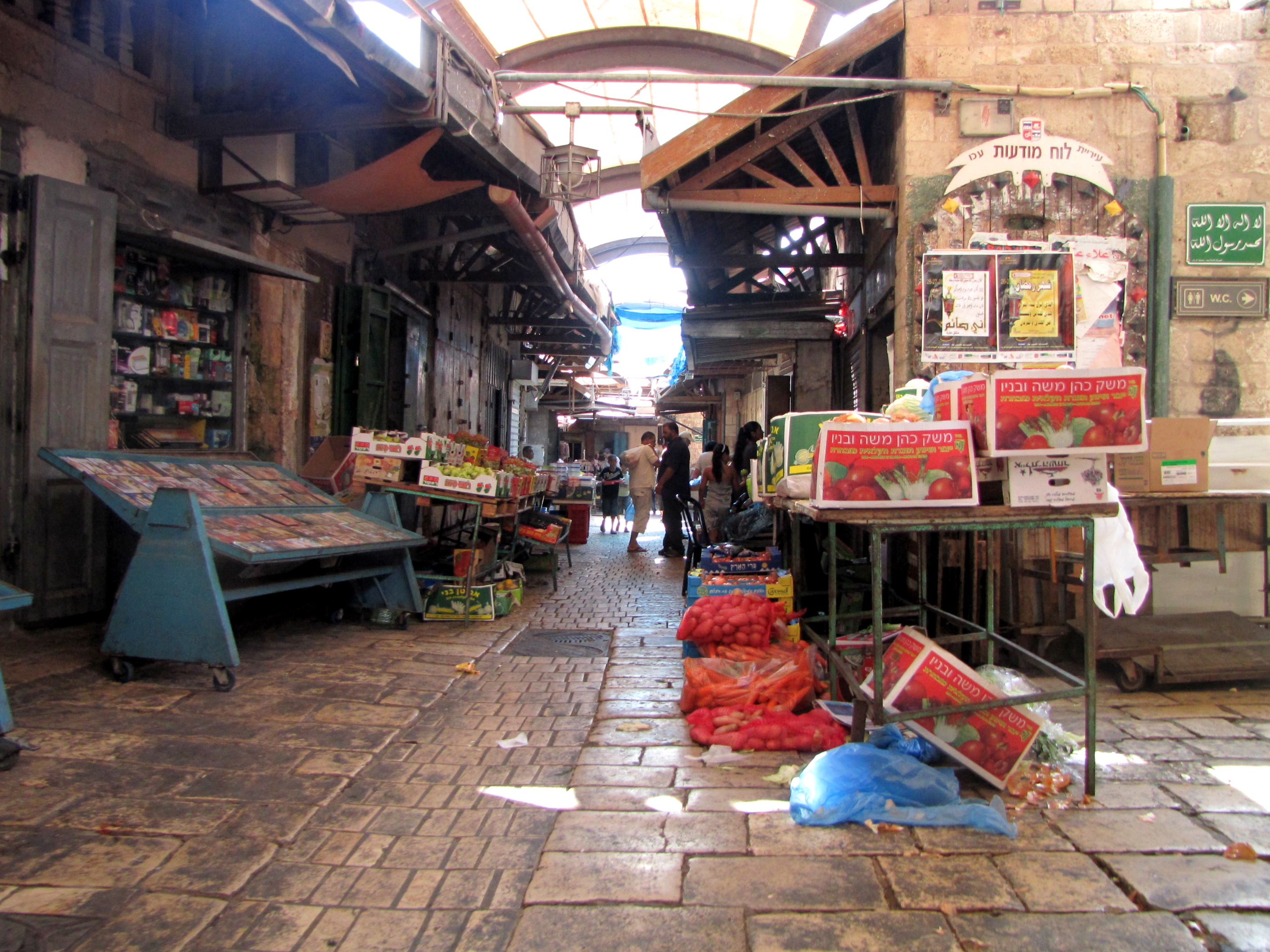 Straße in Akko.